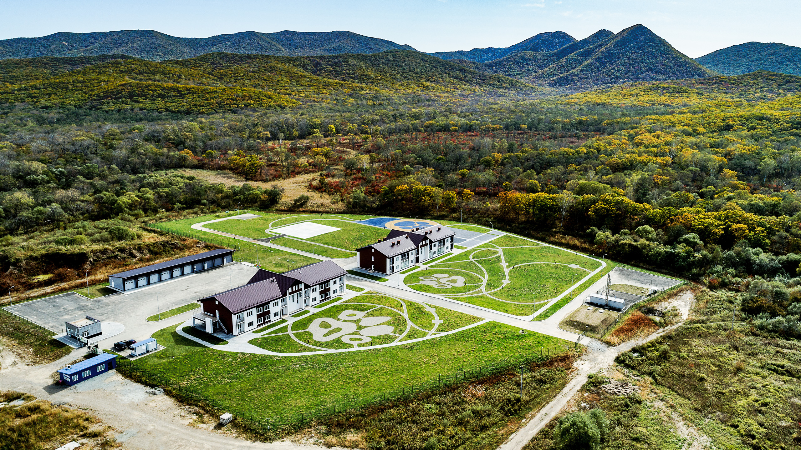 Национальный парк «Земля леопарда»: на территории Хасанского и Надеждинского районов, а также Уссурийского и Владивостокского городских округов, Приморский край This image is related to the protected area of Russia number 2500152